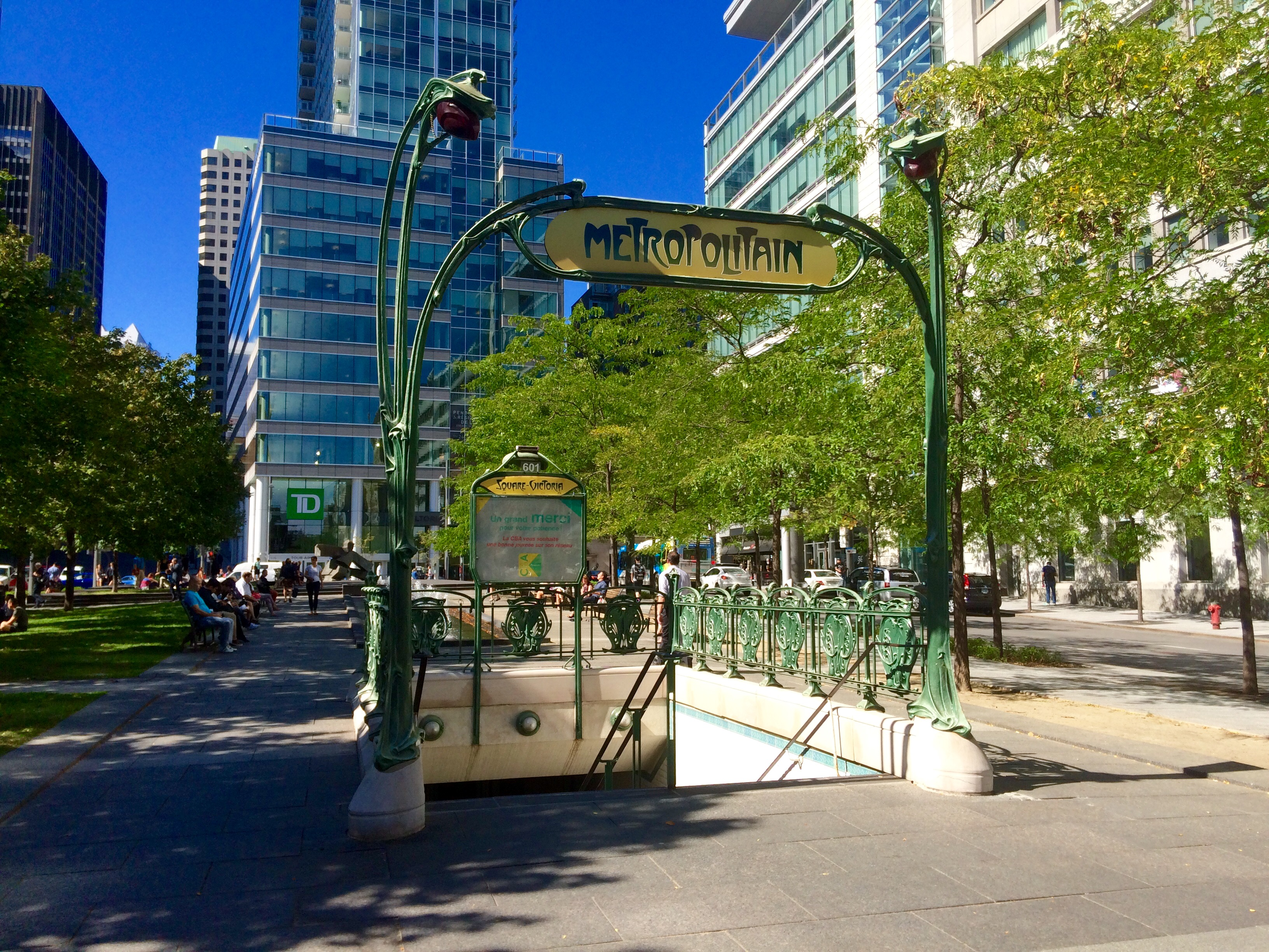 Square Victoria's Hector Guimard entrance.